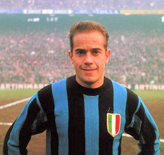 Luisito Suarez, negli anni '60, ai tempi della "Grande Inter" nello stadio San Siro a Milano. Licensing Suárez Miramontes, Luis Categoria:Immagini di Luis Suárez Miramontes